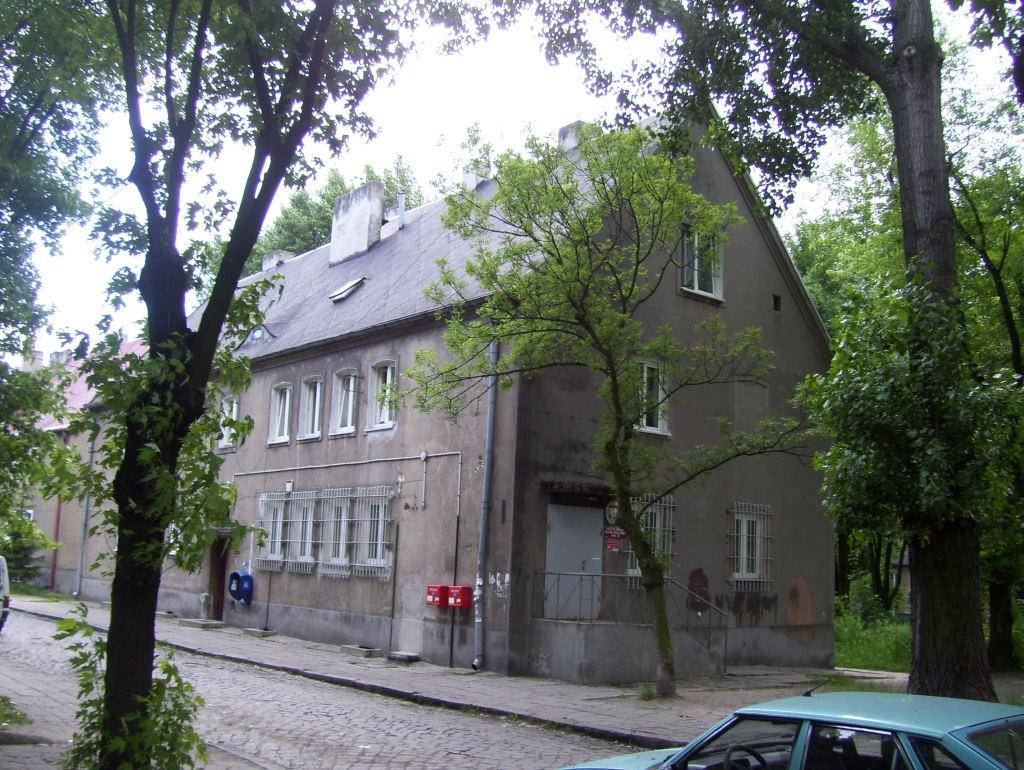 Kamienica na osiedlu Stoki. Urząd Pocztowy Łódź 22 przy ul. Skalnej.